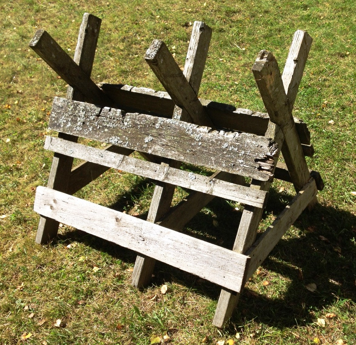 Sagkrakk